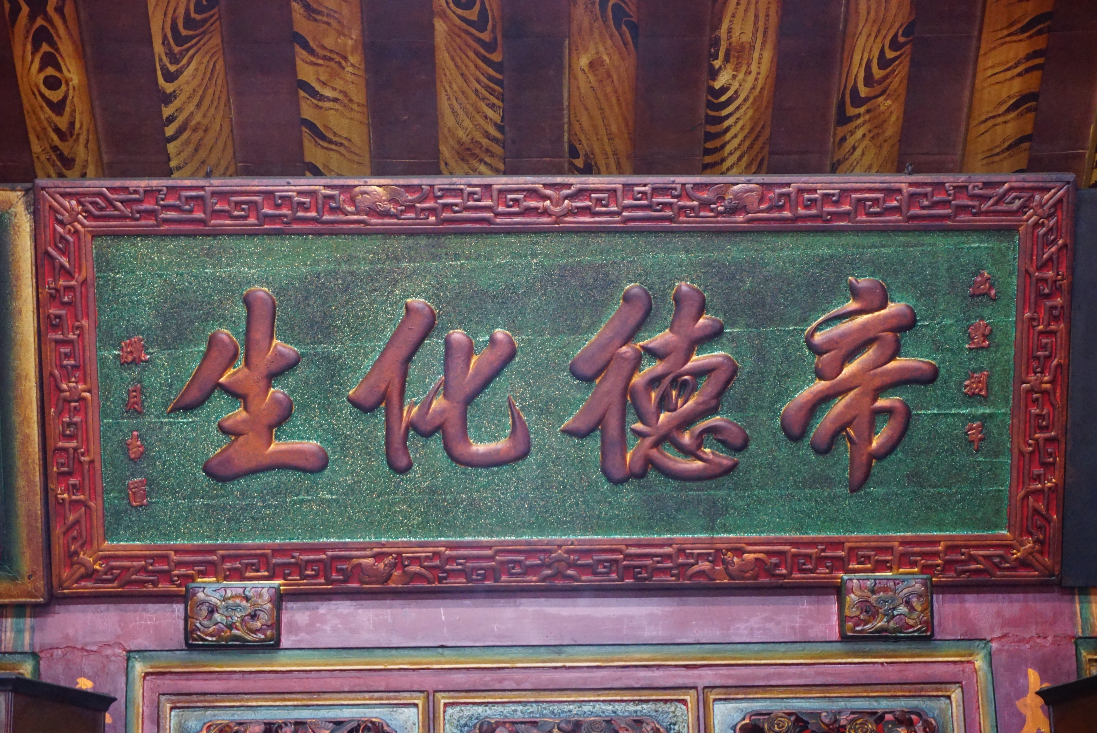 中文（台灣）: 新港大興宮「帝德化生」古匾，咸豐八年立